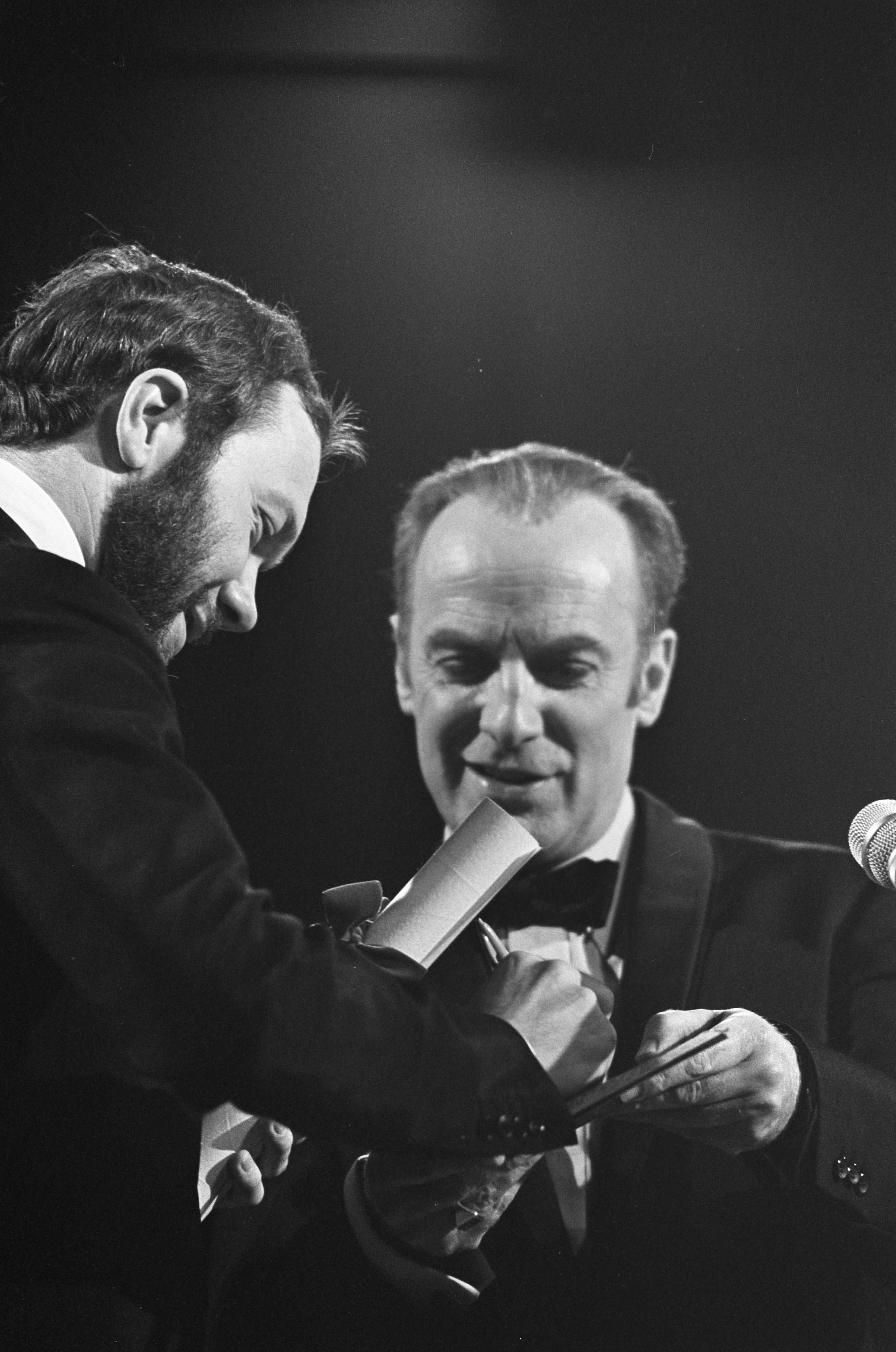 Collectie / Archief : Fotocollectie Anefo Reportage / Serie : Grand Gala du Disque 1968 Beschrijving : Grand Gala du Disque . Peter Brown (manager Beatles) ontvangt Edison uit handen van Wim Sonneveld Datum : 8 maart 1968 Locatie : Amsterdam Trefwoorden : prijsuitreikingen Persoonsnaam : Brown, Peter (muziekproducer), Sonneveld, Wim Instellingsnaam : Beatles, Edison Fotograaf : Kroon, Ron / Anefo Auteursrechthebbende : Nationaal Archief Materiaalsoort : Negatief (zwart/wit) Nummer archiefinventaris : bekijk toegang 2.24.01.05 Bestanddeelnummer : 921-1488